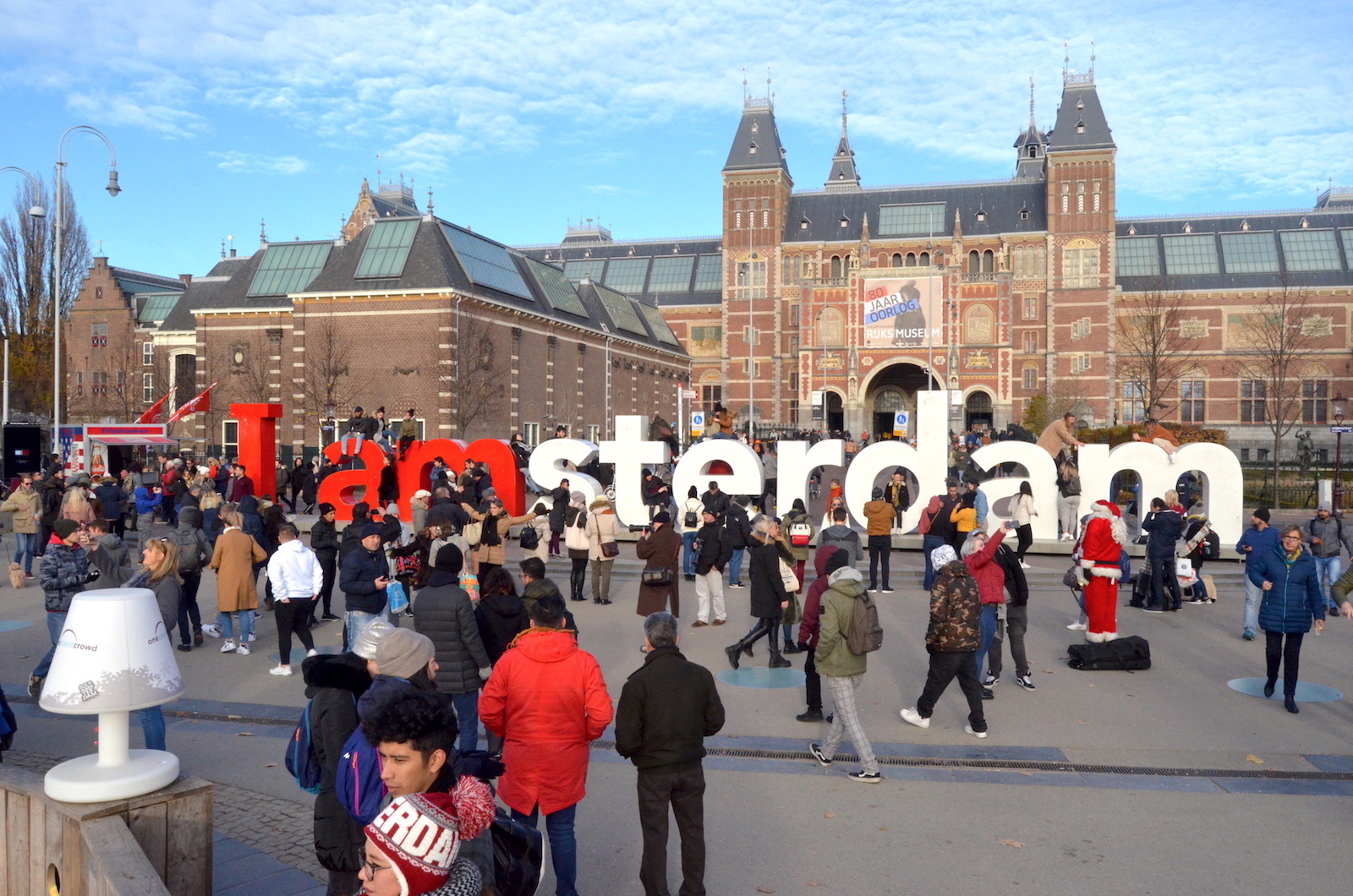 Toeristendrukte bij I amsterdam op het Museumplein. Foto: Erik Swierstra.